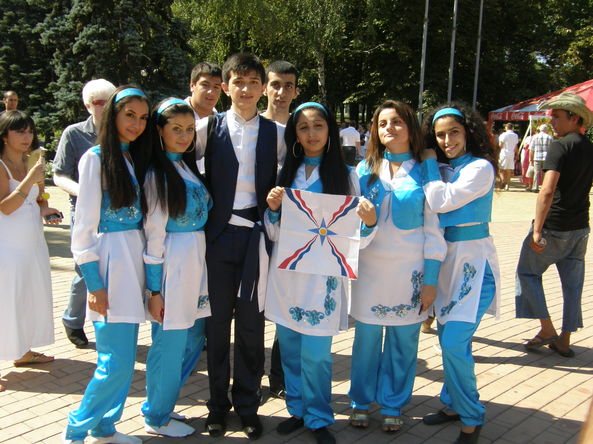 Донецк. Празднование дня независимости Украины.